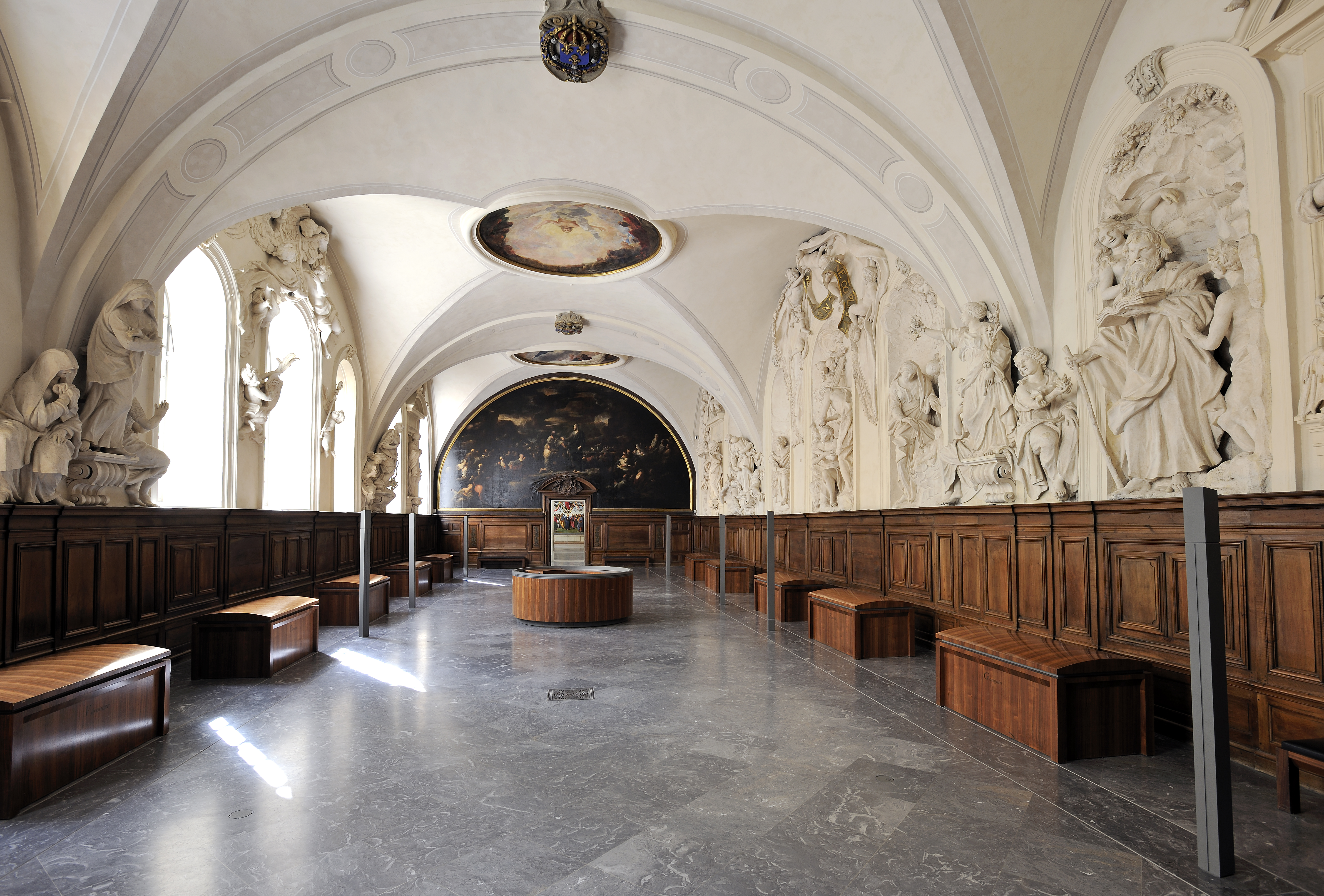 Vaste pièce rectangulaire et voûtée, de 25 x 10 m environ,est éclairée, au sud, par sept fenêtres. Des lambris ornent la partie basse, tandis que la partie haute est ornée de figures en stuc sur les deux longs côtés. Les petits côtés présentent deux grandes toiles cintrées dont le tableau de la Multiplication des pains par le peintre Louis Cretey est visible sur cette image.